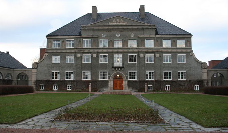 Norwegian School of Veterinary Science (Norges veterinærhøgskole), Ullevålsveien 72